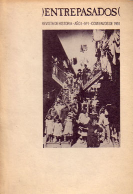 Entrepasados